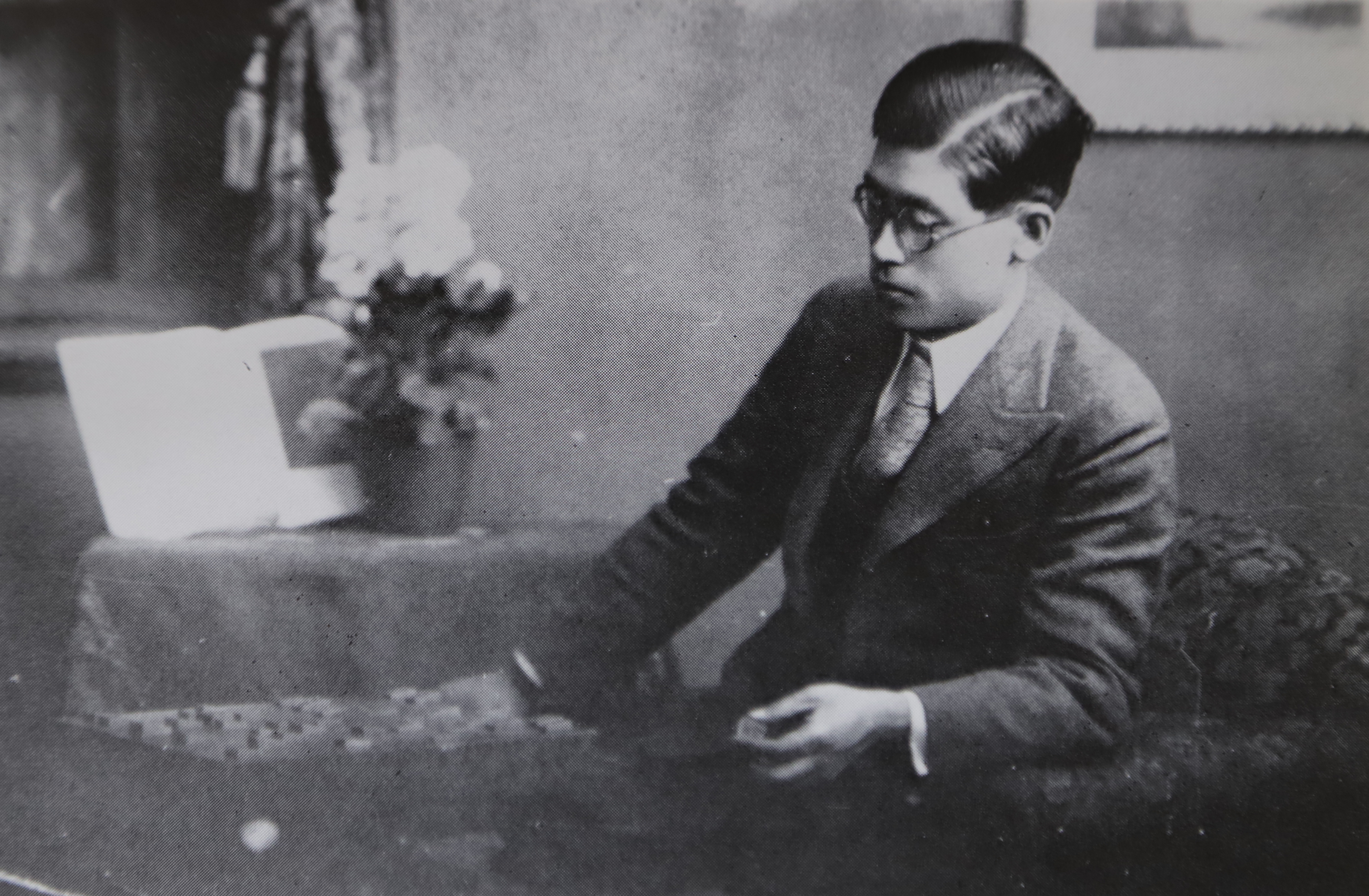 1934年2月に撮影された中島敦。文献上は「記念写真（昭和9年2月）」と表現されている。